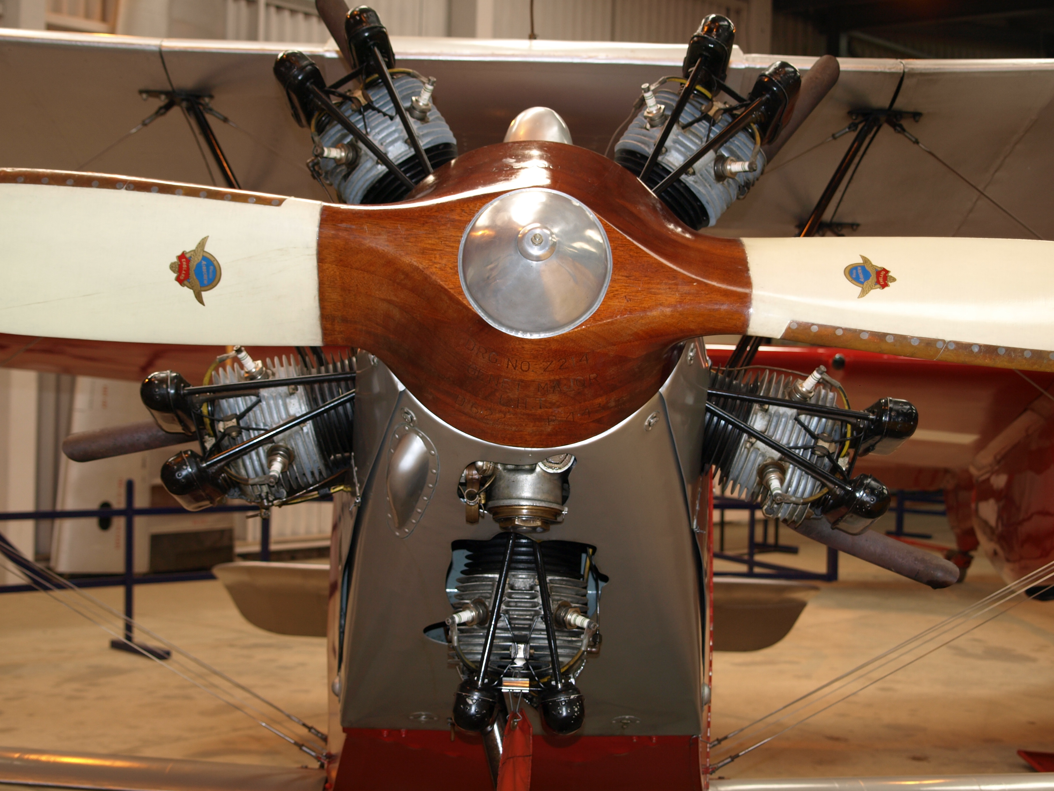 Armstrong Siddeley Genet Major aero engine